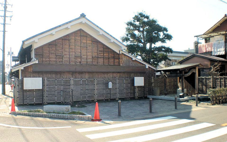 愛知県小牧市にあった小牧宿と小牧御殿、小牧代官所などの案内所のパノラマ写真（ソフトウェアにて合成）。左側にある家屋は、旧家・岸田家の屋敷。